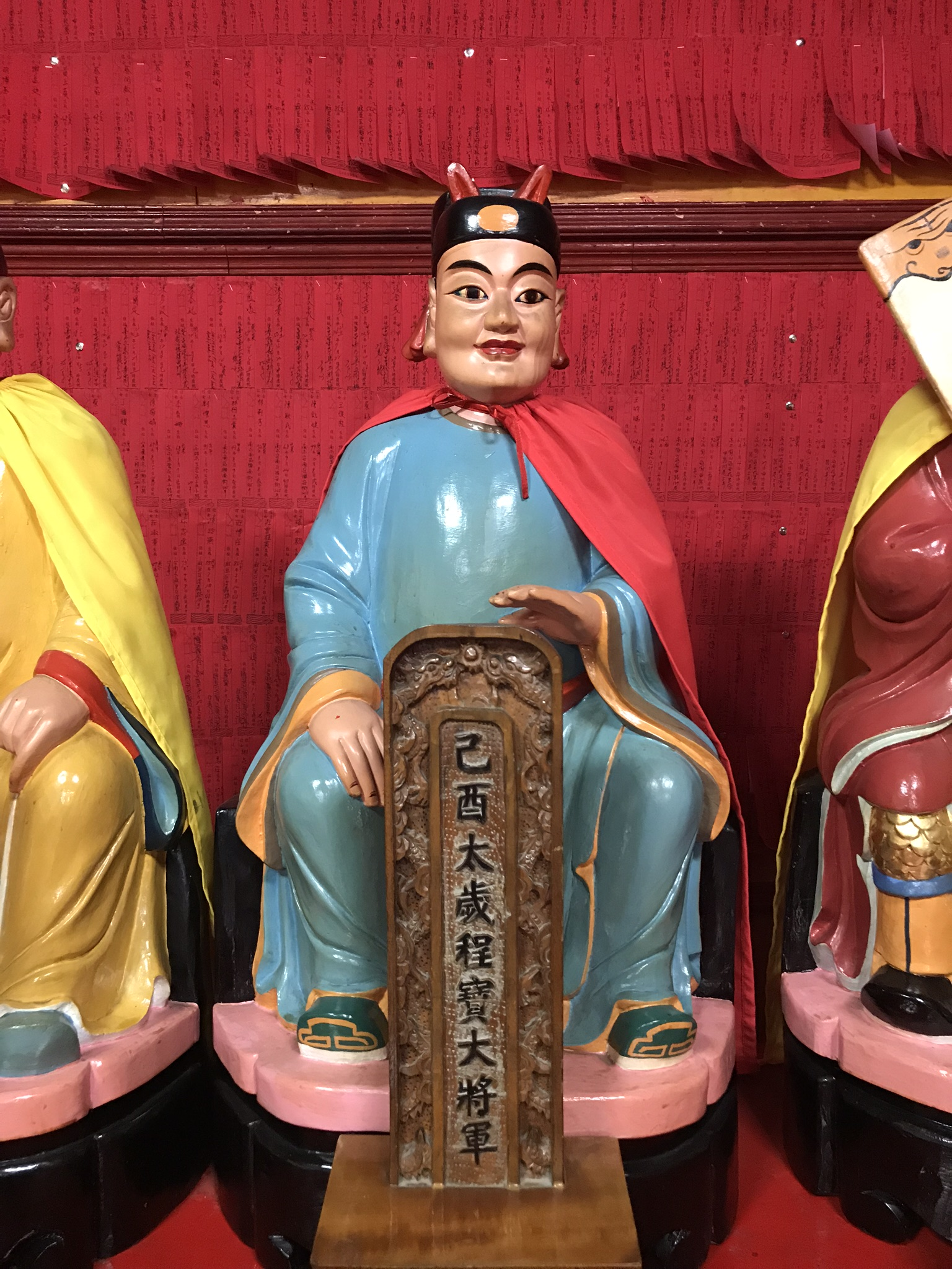 麻豆代天府己酉太歲程寶大將軍神像